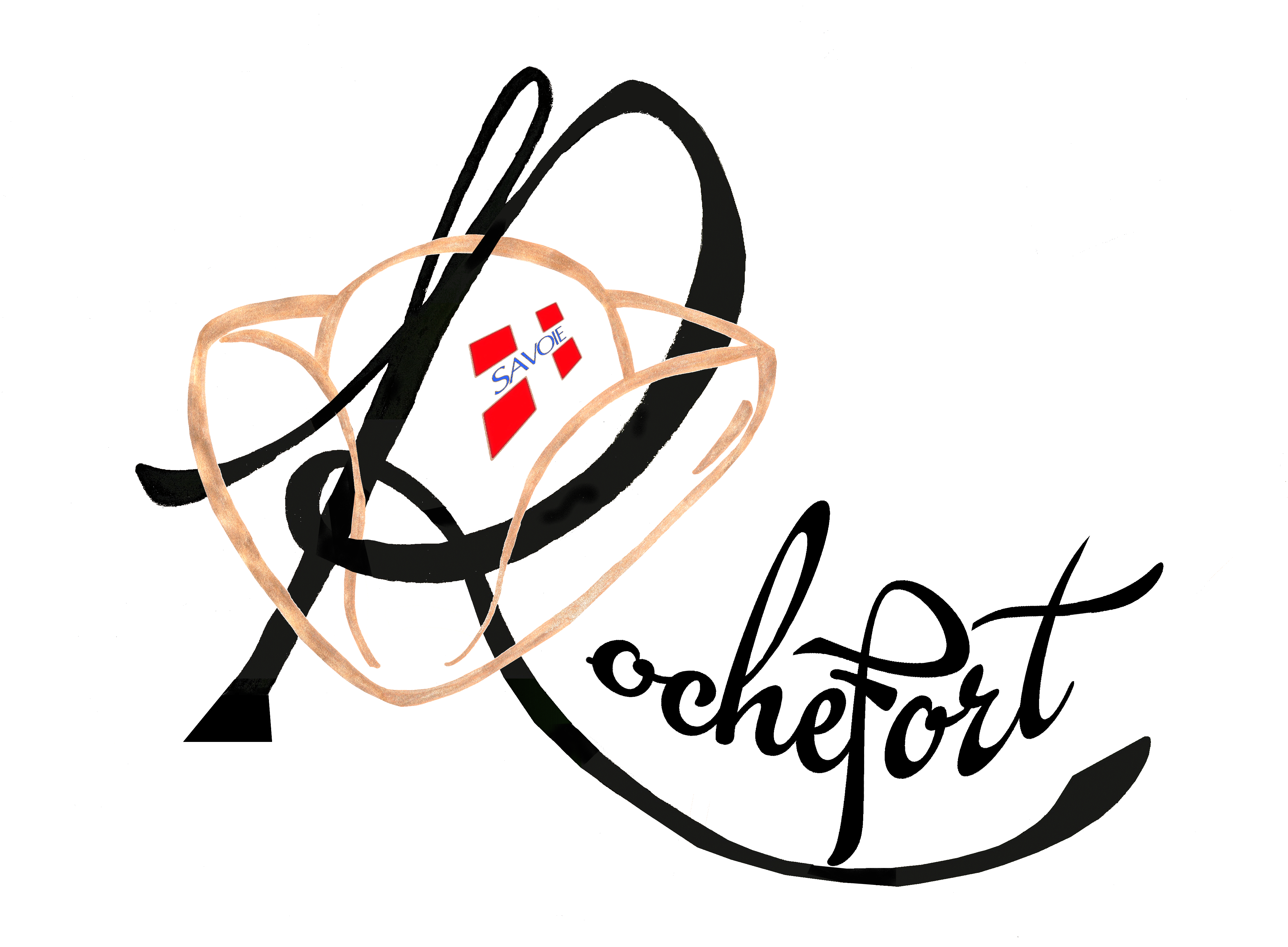 Logo de Rochefort, conçu et réalisé par Jean-marc et Océane Muroni, dépôt légal le 03/11/2014.